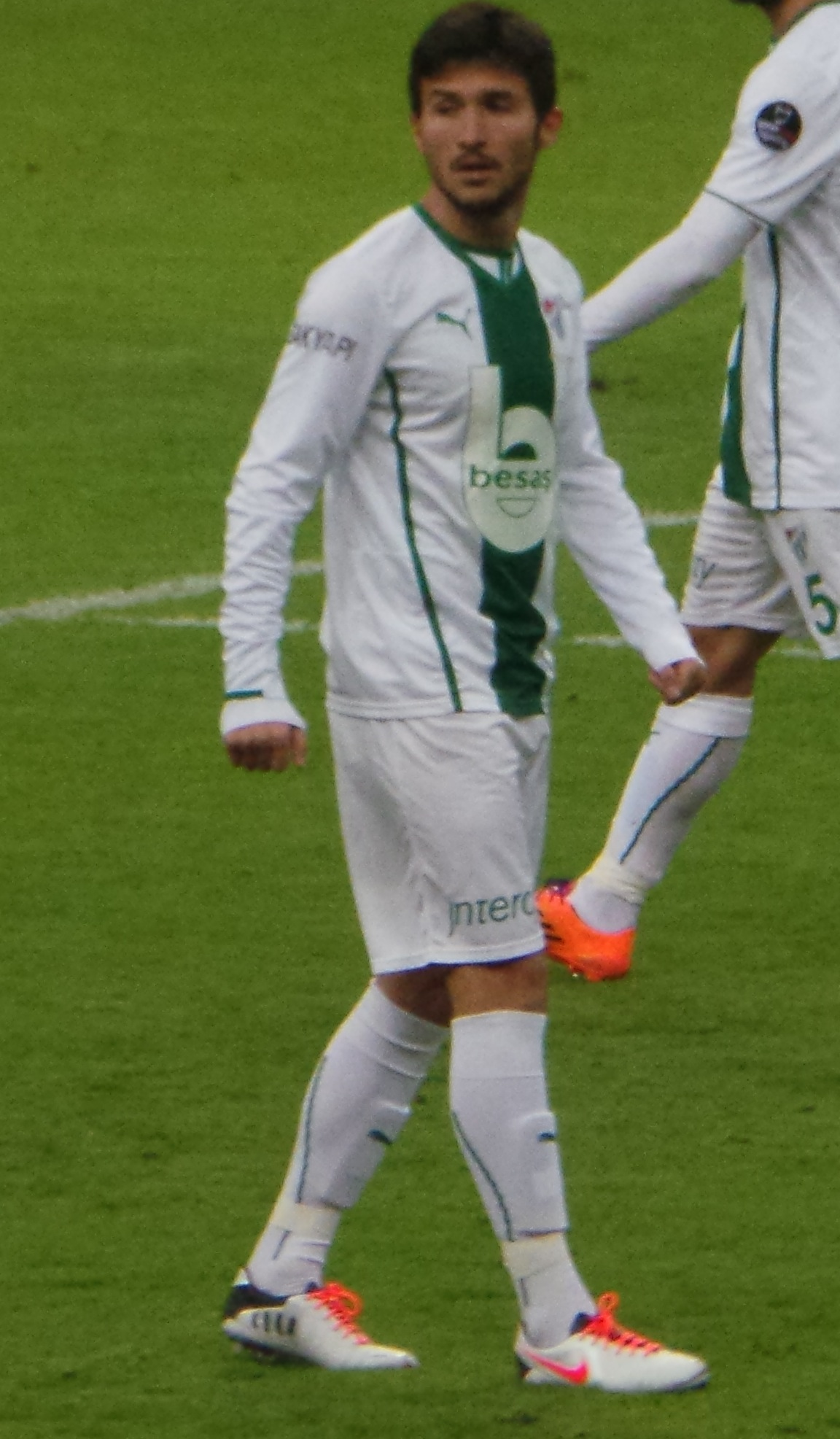 Bekir Yılmaz